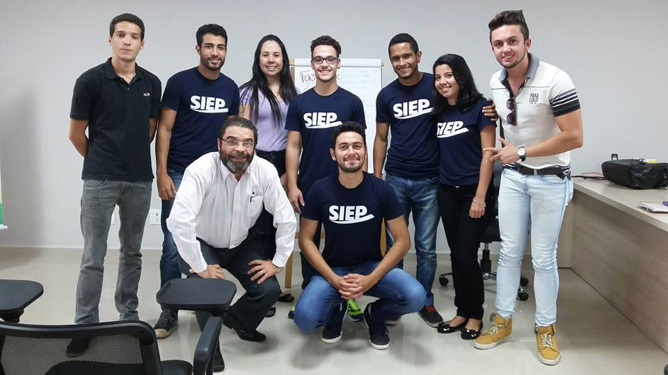 Planejamento estratégico da Sociedade de Integração dos Estudantes Paranaenses, em 15 de janeiro de 2016.